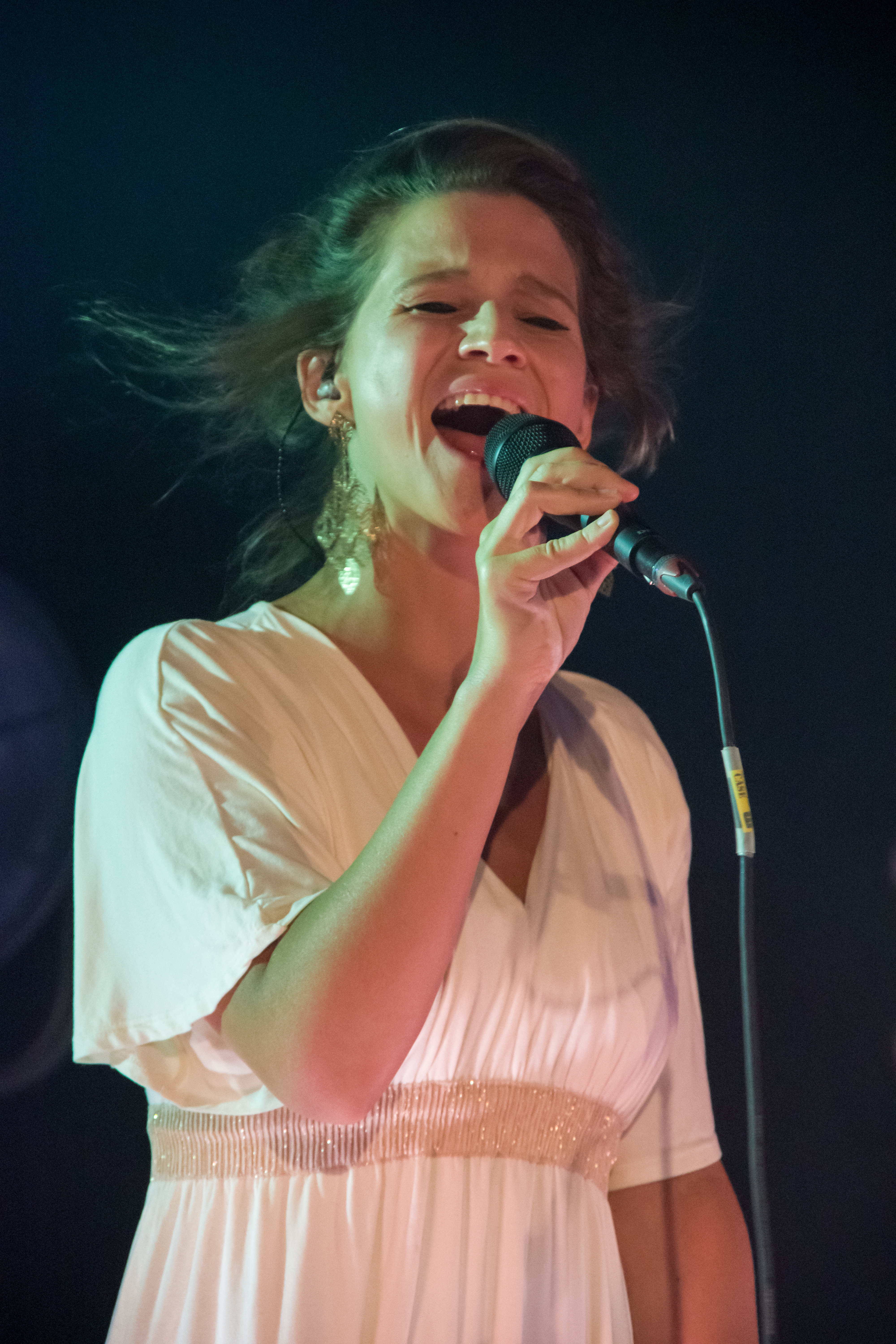 Das Zelt-Musik-Festival 2018 in Freiburg im Breisgau 26.07.2018 Selah Sue